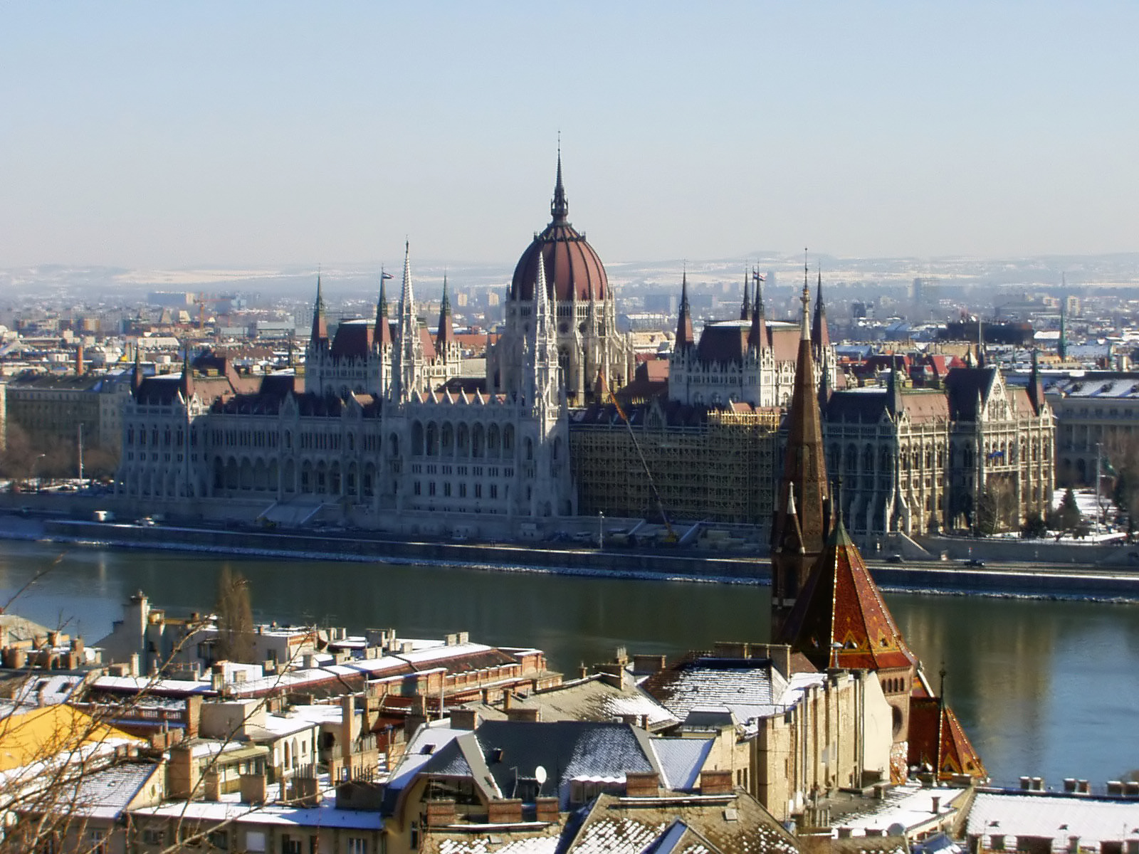 Вид на парламент с будайской крепости